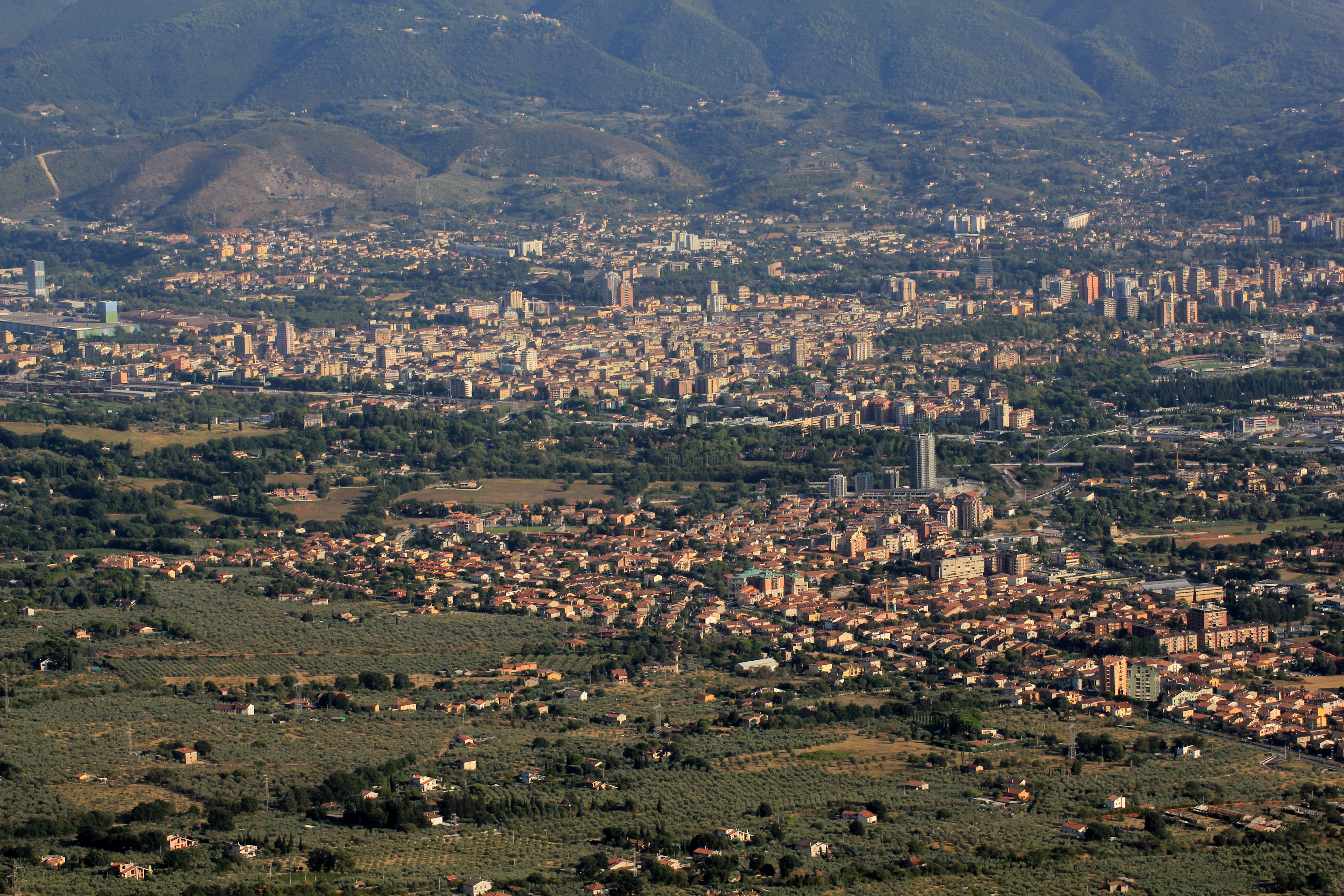 Panorama della città di Terni e dei suoi principali quartieri, oltre che parte delle accaierie, fotografati da Sant'Erasmo di Cesi.